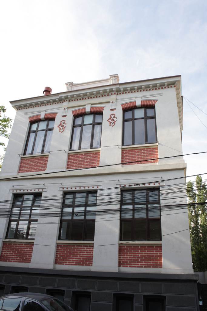 Casă, Str. Sevastopol 19 sector 1 (actualmente 17C, lipsesc 17B, 17A, iar 19A este curtea din dreapta)